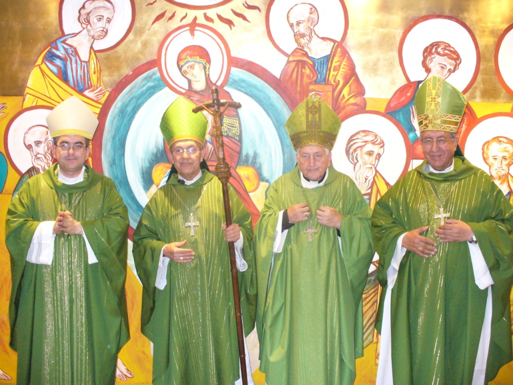 Obispos